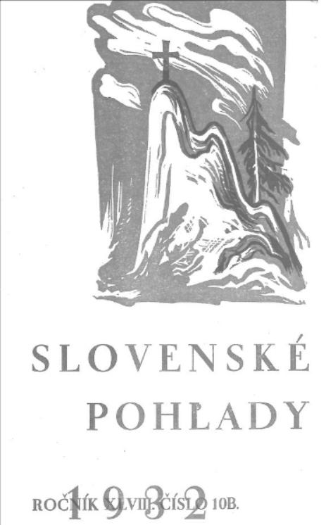 Titulný list slovenského periodika Slovenské pohľady z r. 1932